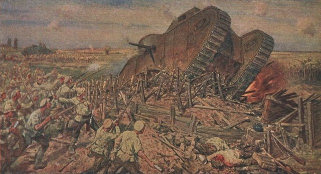 Картины художника Ивана Владимирова (1870-1947)